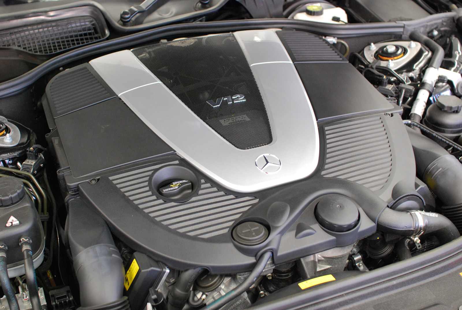 Mercedes-Benz M275 5.5L V12 SOHC Twin-Turbo Engine installed in Mercedes-Benz CL600